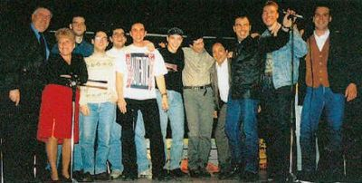 Los integrantes de Antena 2000 en un teatro público del Ayuntamiento de L'Hospitalet, Barcelona, España.